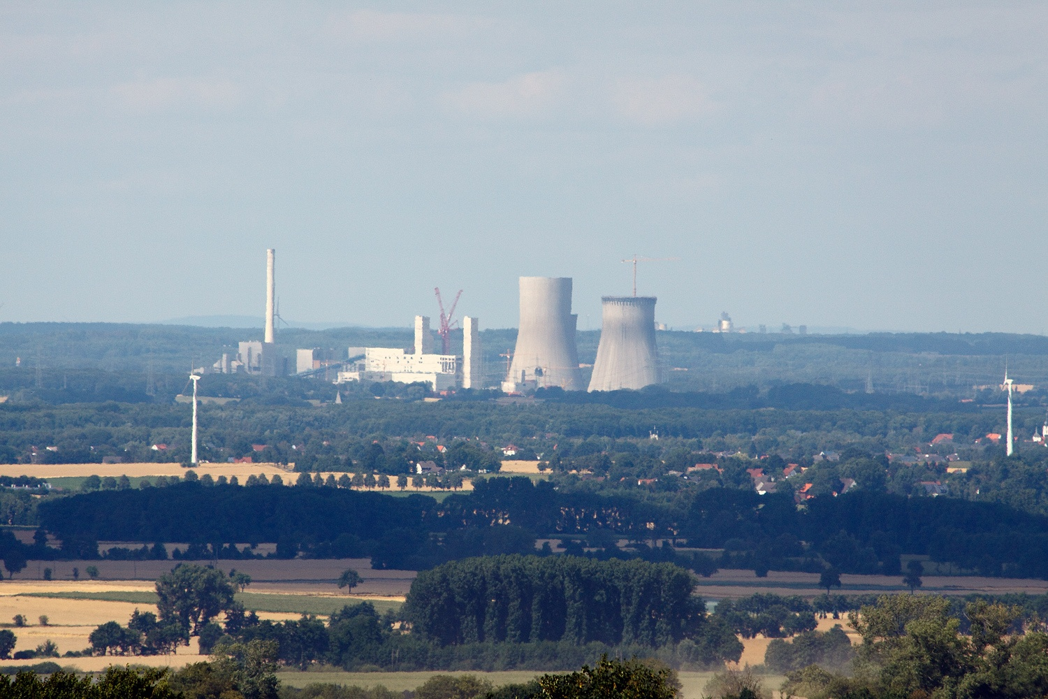 RWE-Kraftwerksneubau in Hamm-Uentrop (Kreis Unna) vom Haarstrang (Bereich Ense, Kreis Soest) aus gesehen